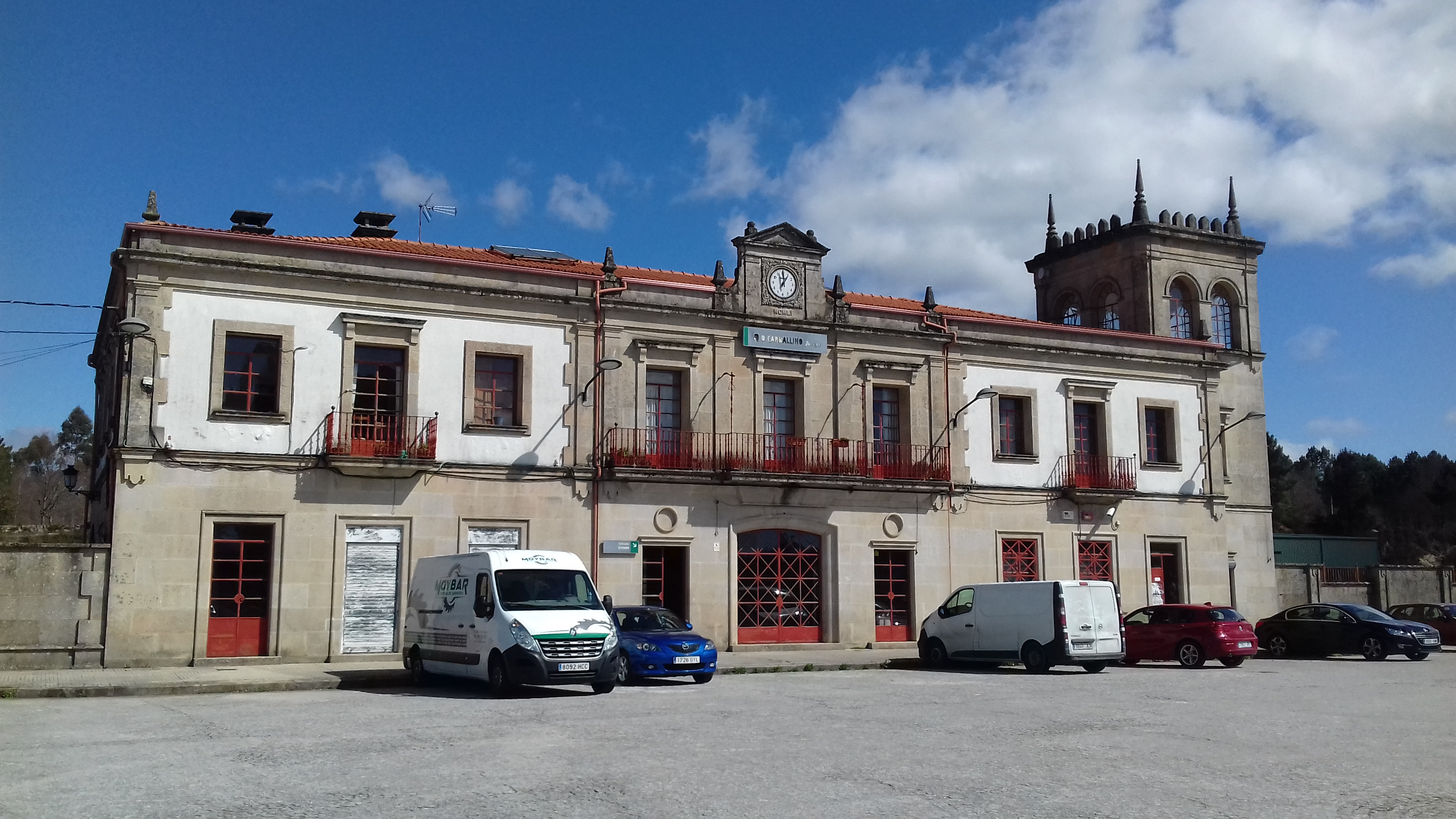 Estación do Carballiño